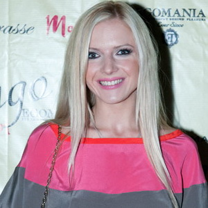 Юлия Михальчик на арт-вечере Корнелии Манго в ресторане La Terrase